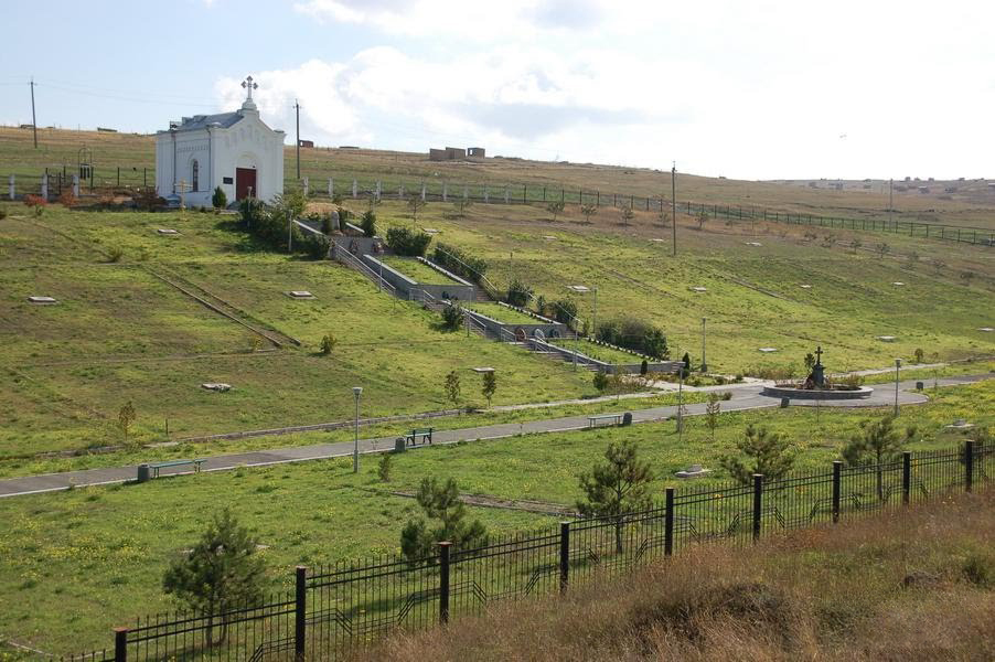 Військово-історичне кладовище (поховані останки 36300 воїнів Кримської армії) та могила генерал-лейтенанта А. К. Абрамова, командира 13-ї піхотної дивізії. (Меморіальний комплекс). Дата подій: 1854–1860 рр.., 1886 р.